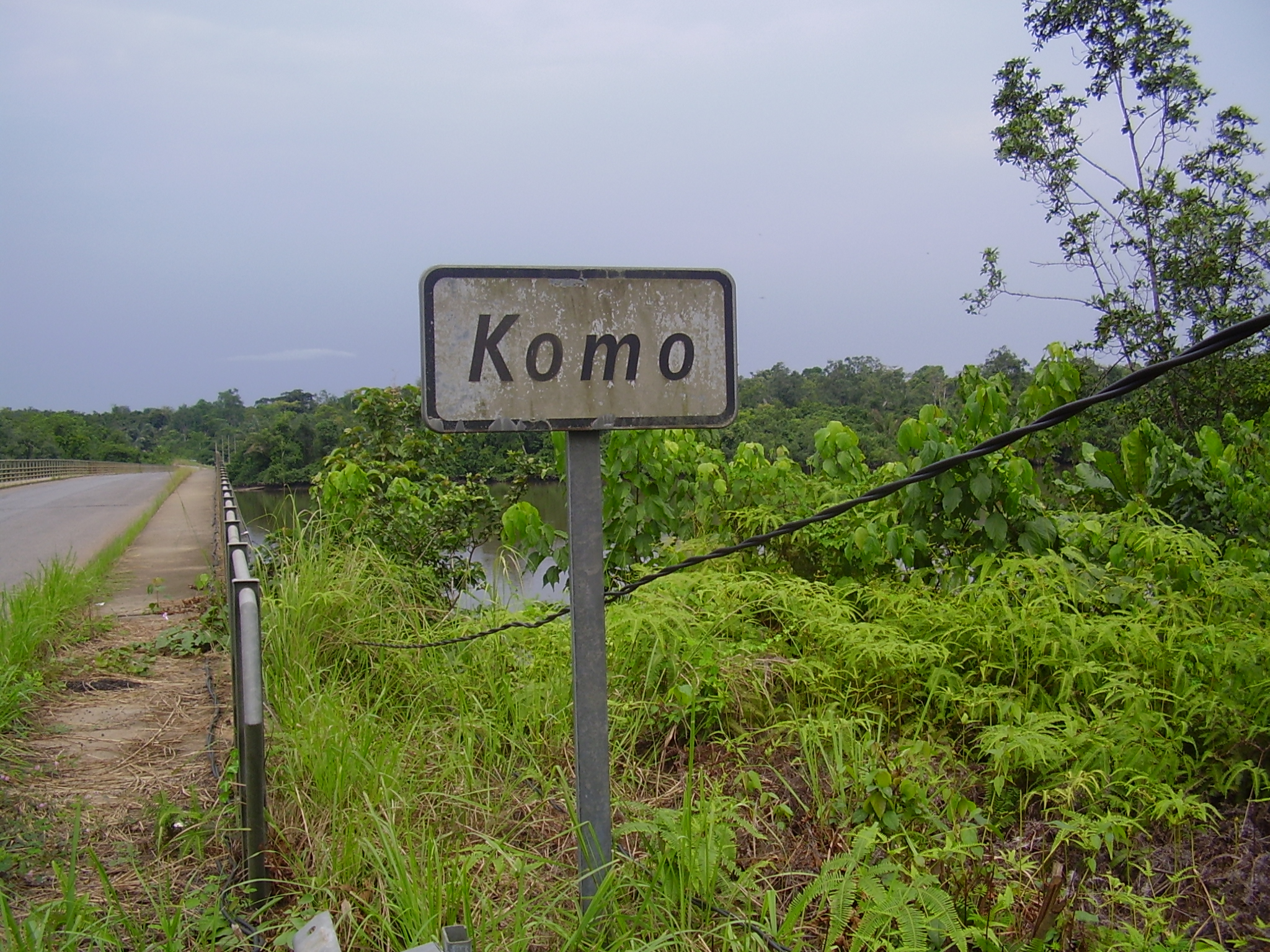 Le fleuve Komo (Gabon) au passage de la route de Libreville à Lambaréné